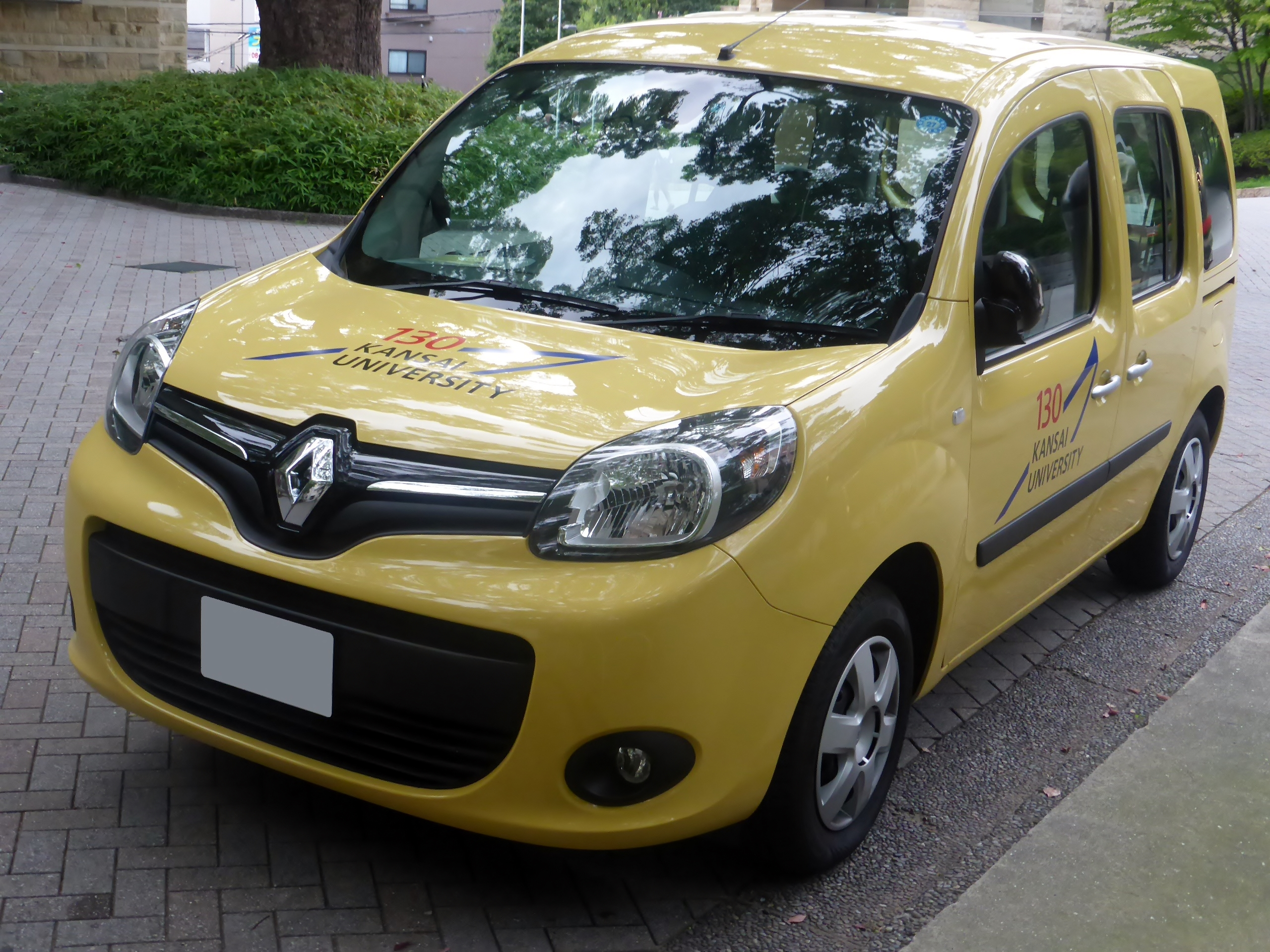 関西大学の業務車両に用いられている2代目ルノー・カングーZENをフロントから撮影。